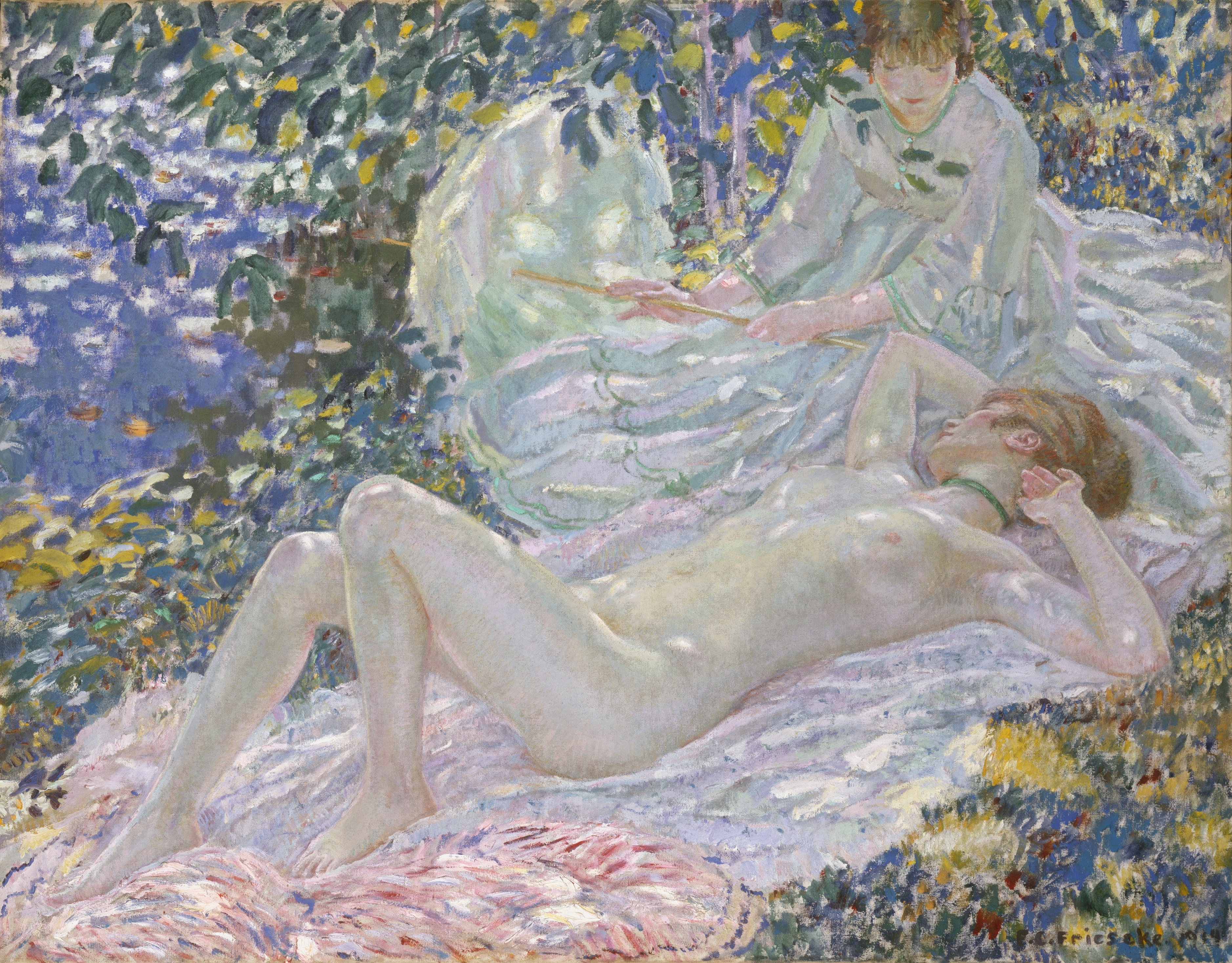 Summer